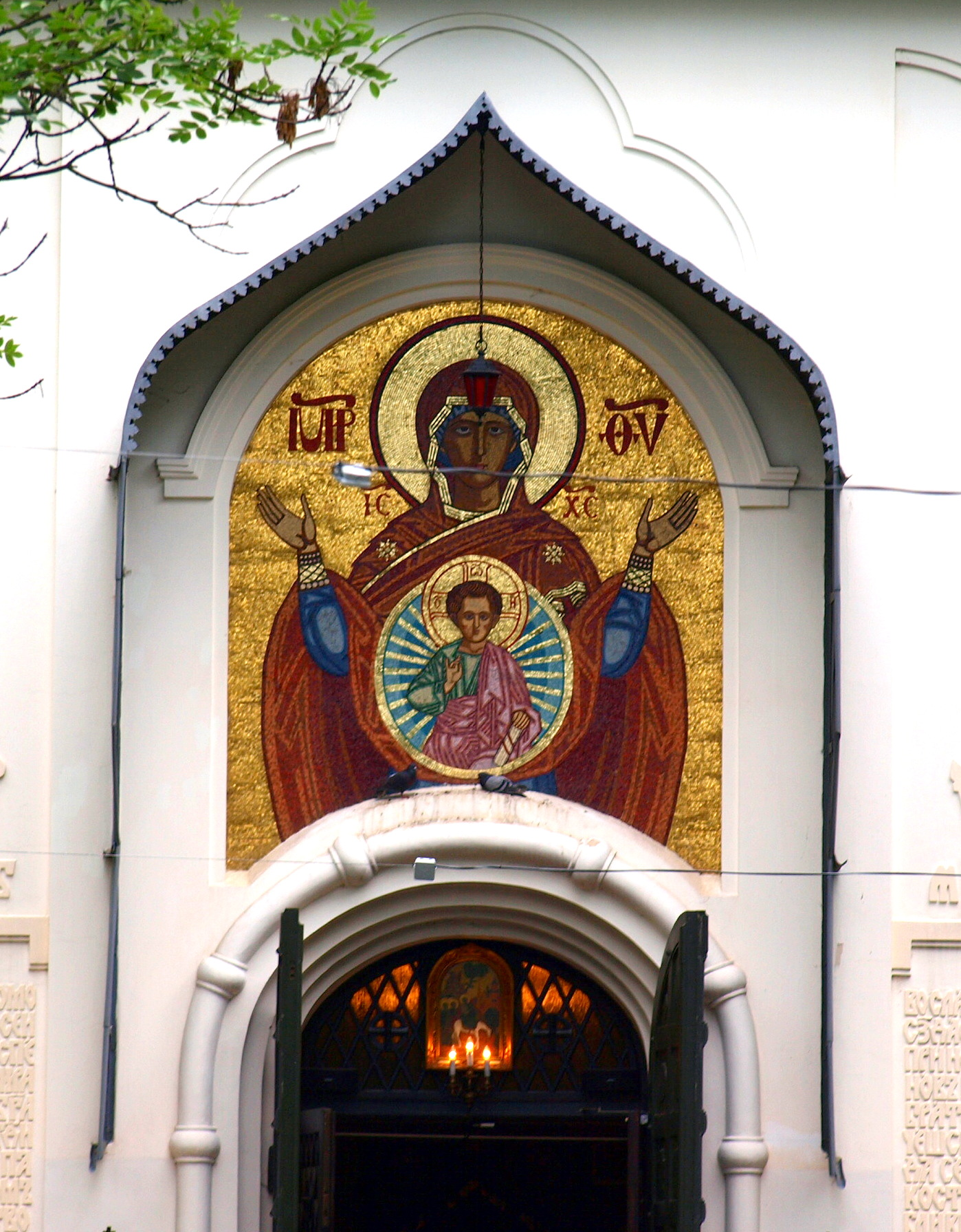 Deatil Uspenského chrámu v Praze